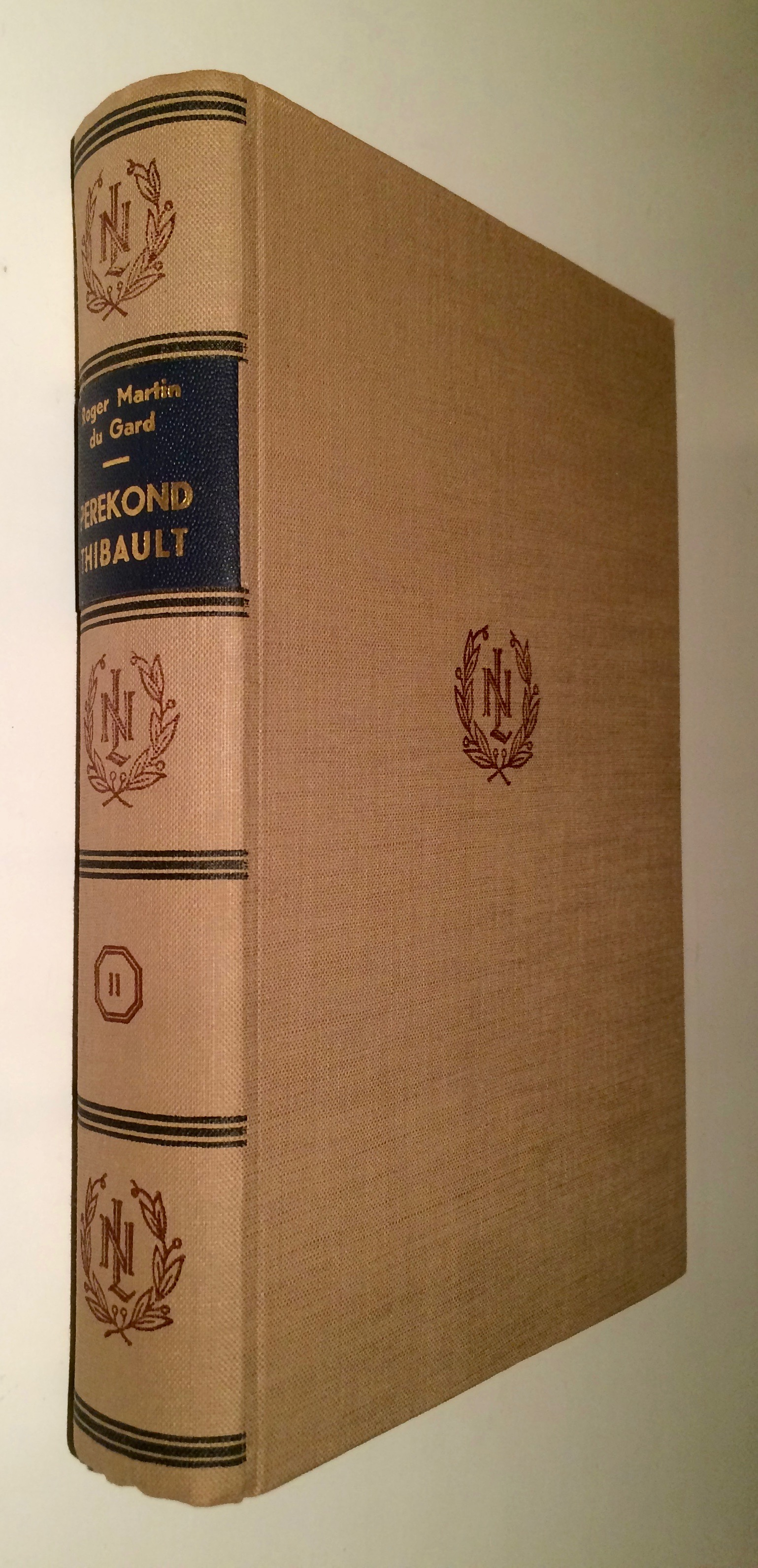 Kalingur- või iluköide